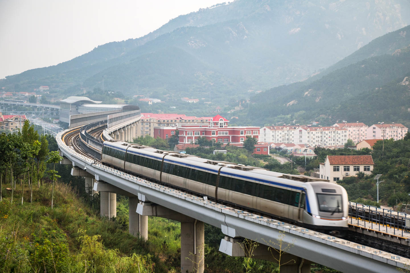 中文（中国大陆）: 青岛地铁11号线列车